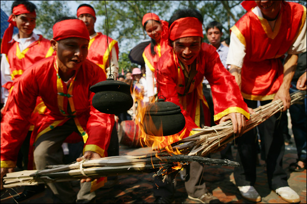 Hội cướp phết.